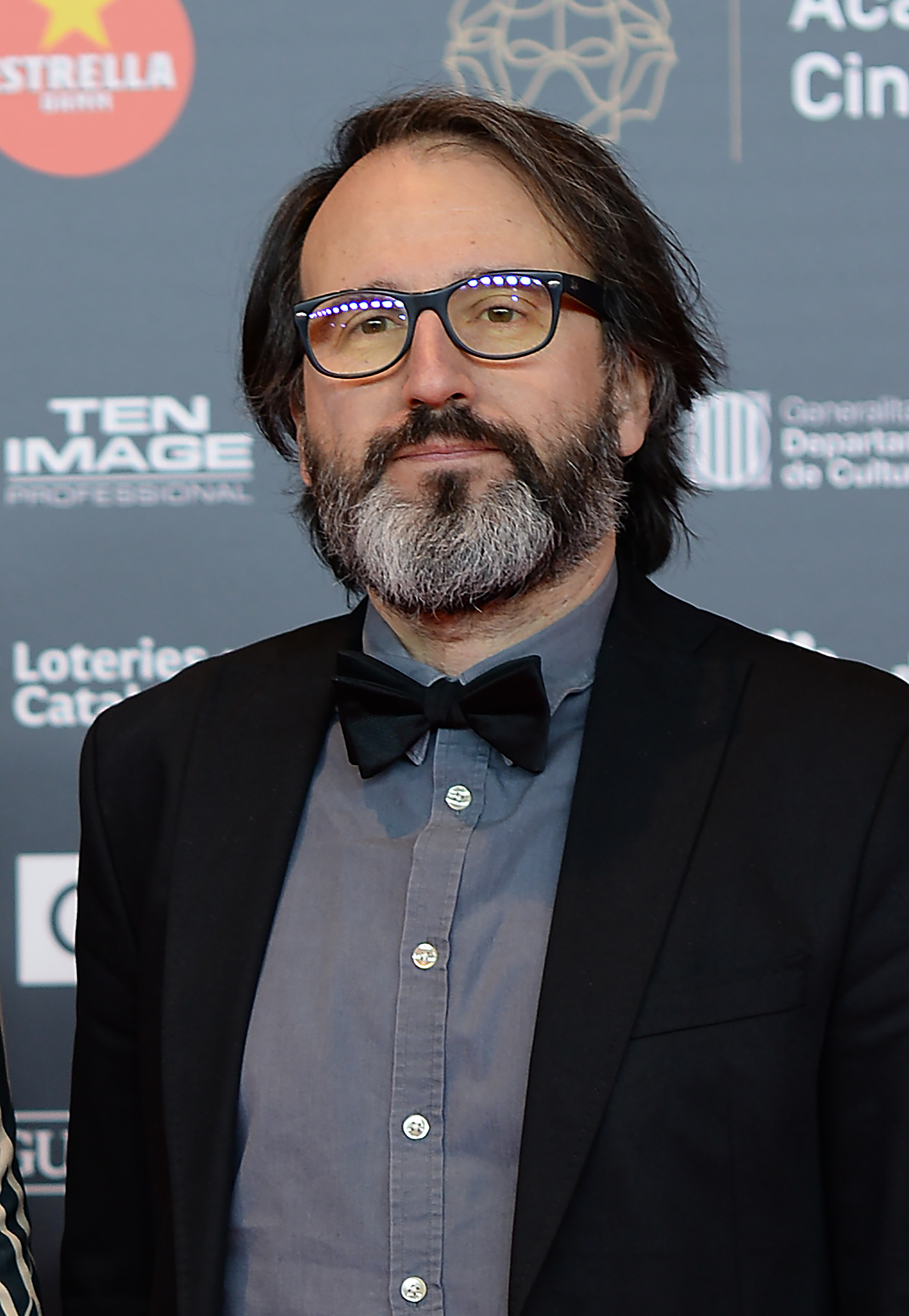 Adán Aliaga, director de cinema, XII Premis Gaudí (2020)